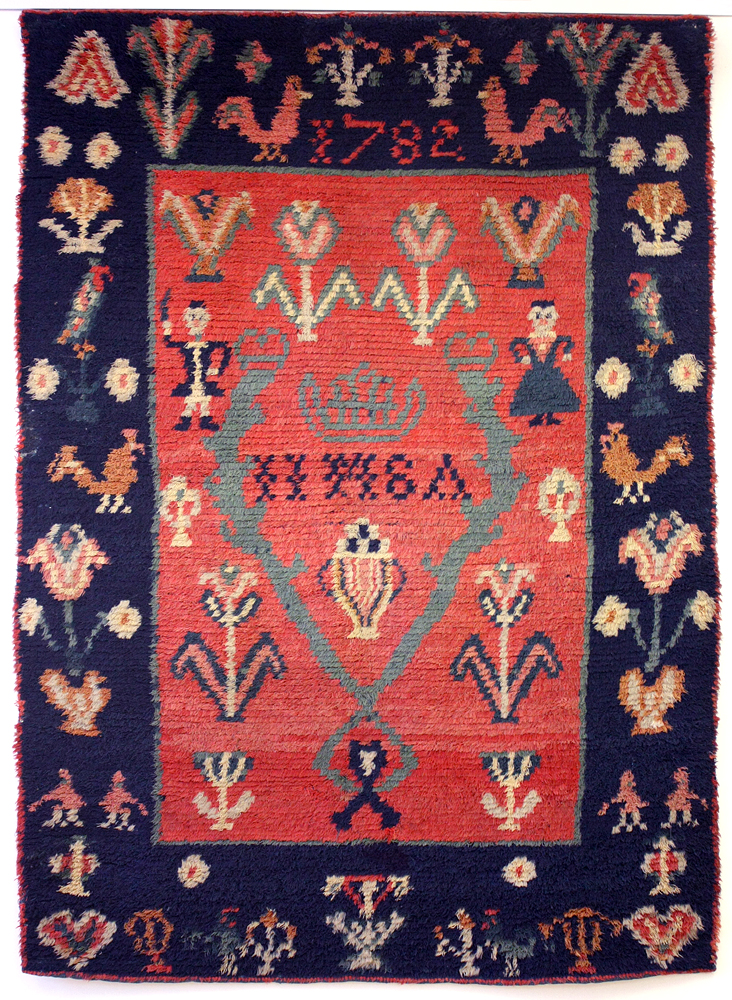 Tunnettu myös nimellä Kukkoryijy. Ryijyssä on vuosiluku 1782. Ryijy kuuluu Gallen-Kallelan Museon kokoelmaan.